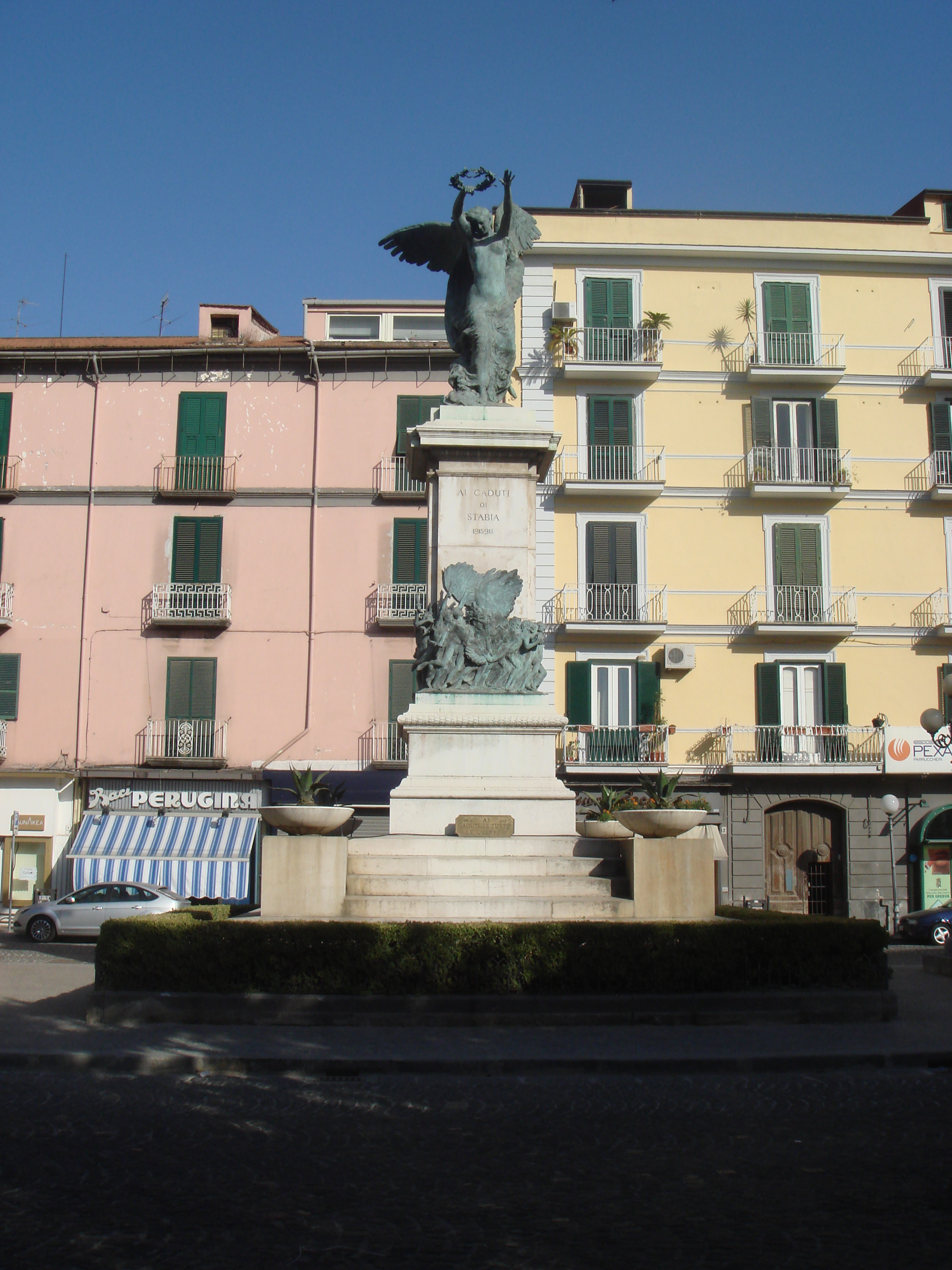 Monumento ai Caduti di Castellammare di Stabia